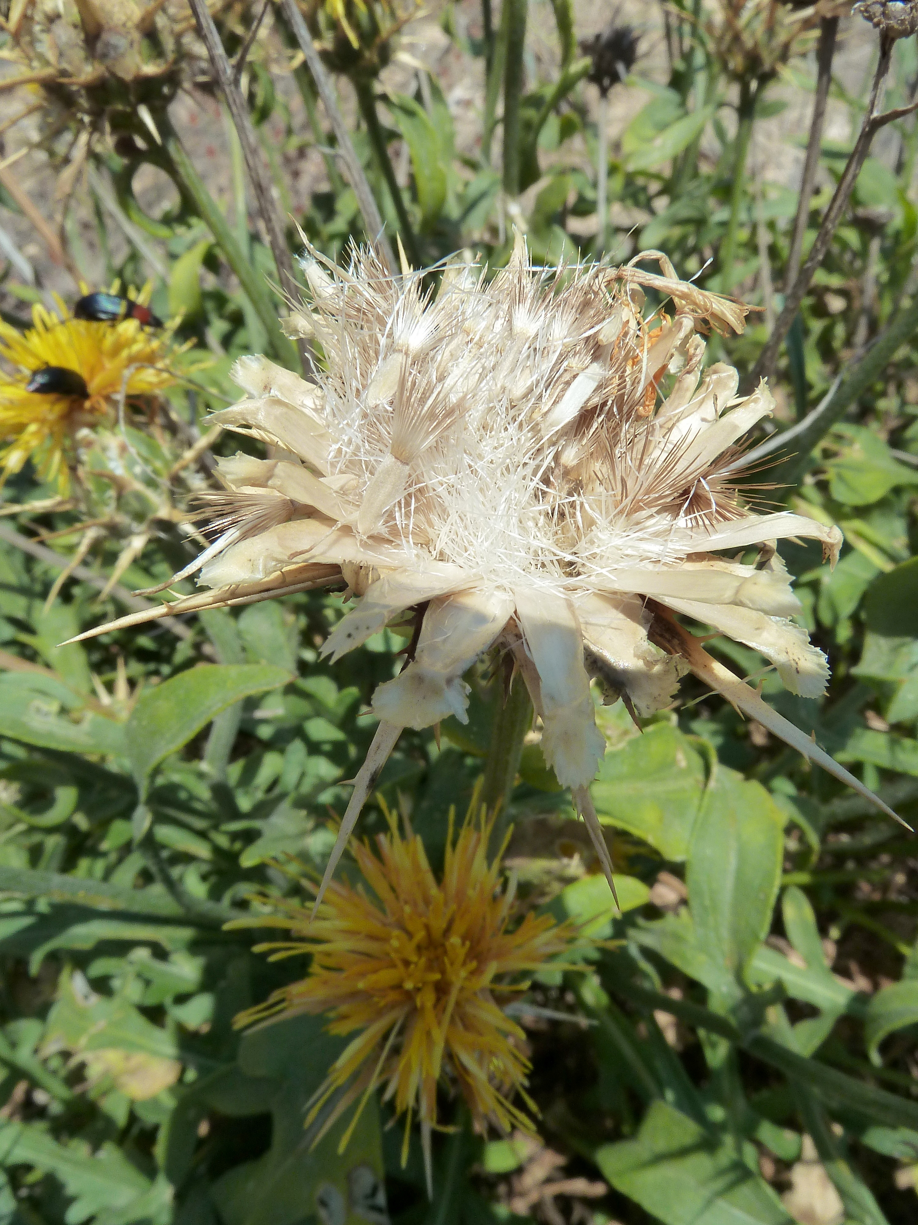 Centaurea saxicola - Post-floración: cipselas in situ - También, detalle de las brácteas internas sin espinas - Cabezo de Pallarés - Albatera (Alicante, España)